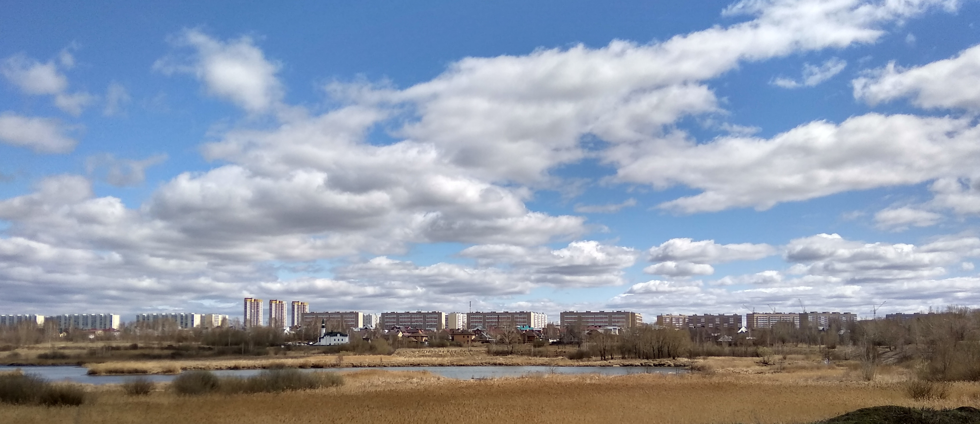 Общий вид на микрорайон Замелекесье в Набережных Челнах